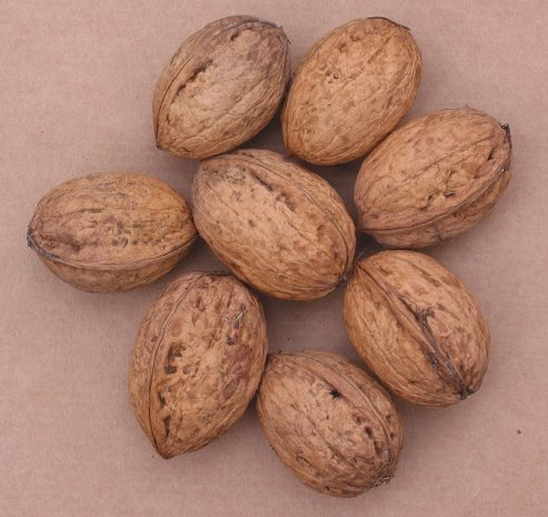 zelfgemaakte foto van walnoot noten 'Broadview'